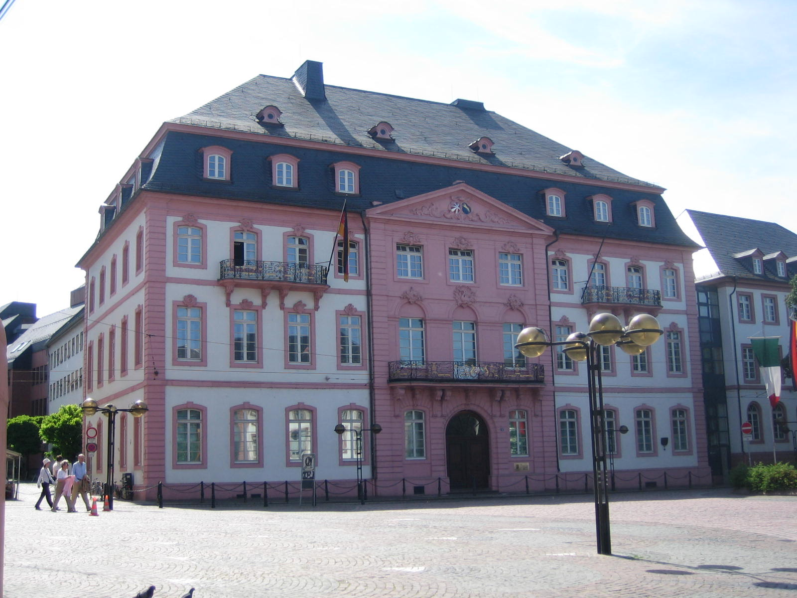 Palais Bassenheim by the Schillerplatz in Mainz